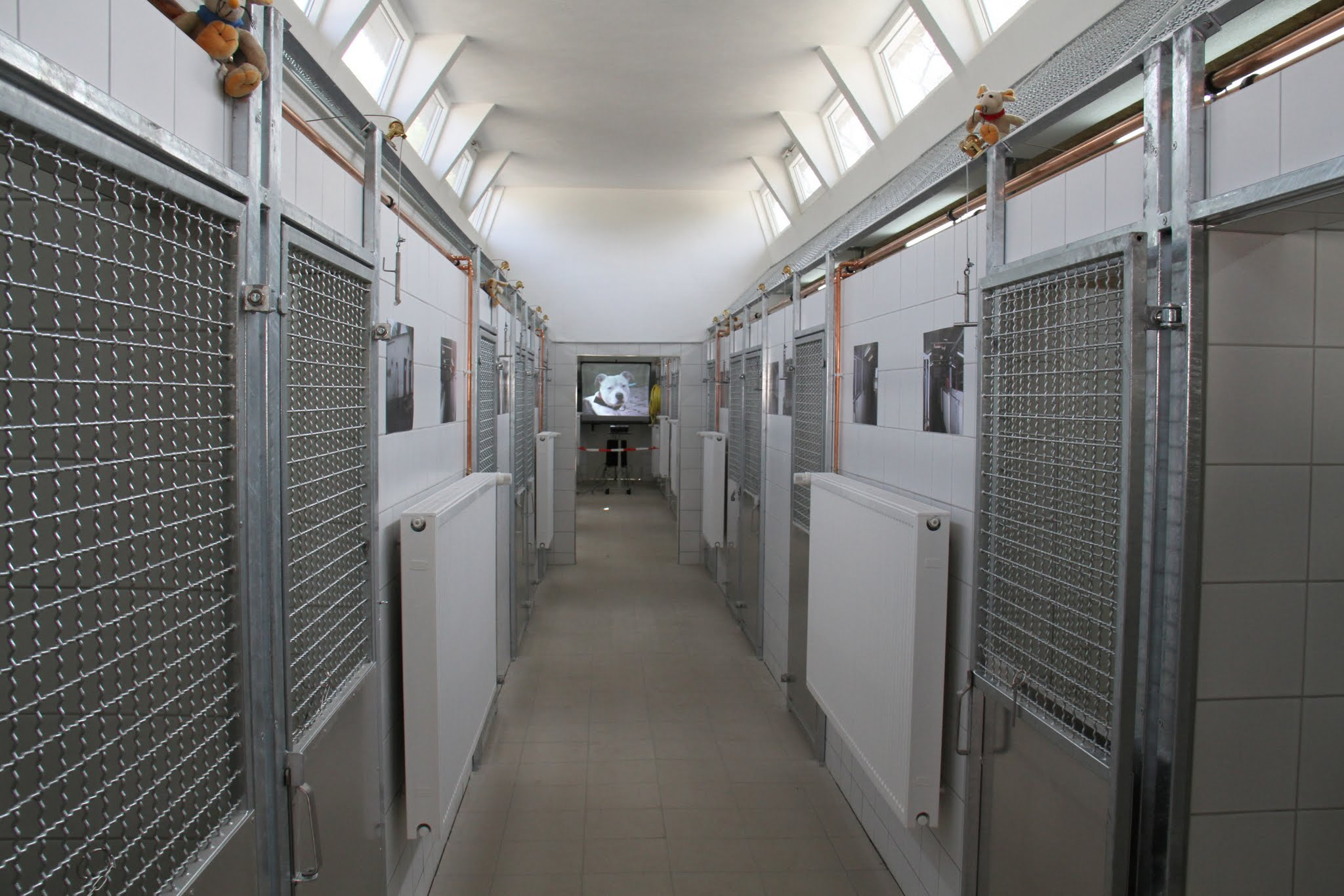 Innenansicht des unteren Hundehauses nach der Sanierung bei der Eroeffnungsfeier am 30.03.2014 im Tierheim Mannheim